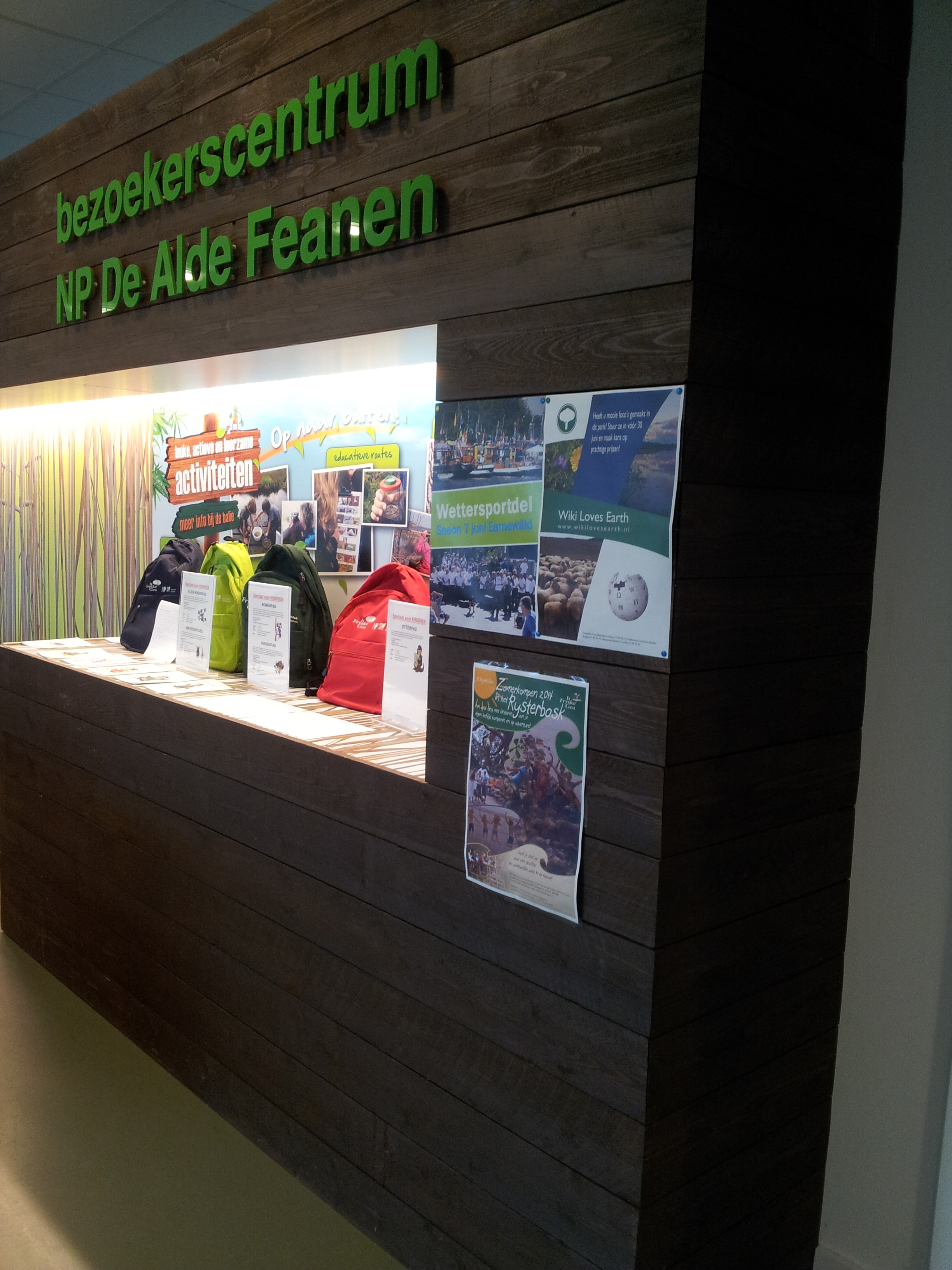 Bezoekerscentrum Nationaal Park Alde Feanen mét poster Wiki Loves Earth This is a photo or sound file made in De Alde Feanen National Park in the Netherlands, with the main subject of the file in the category: humans in nature